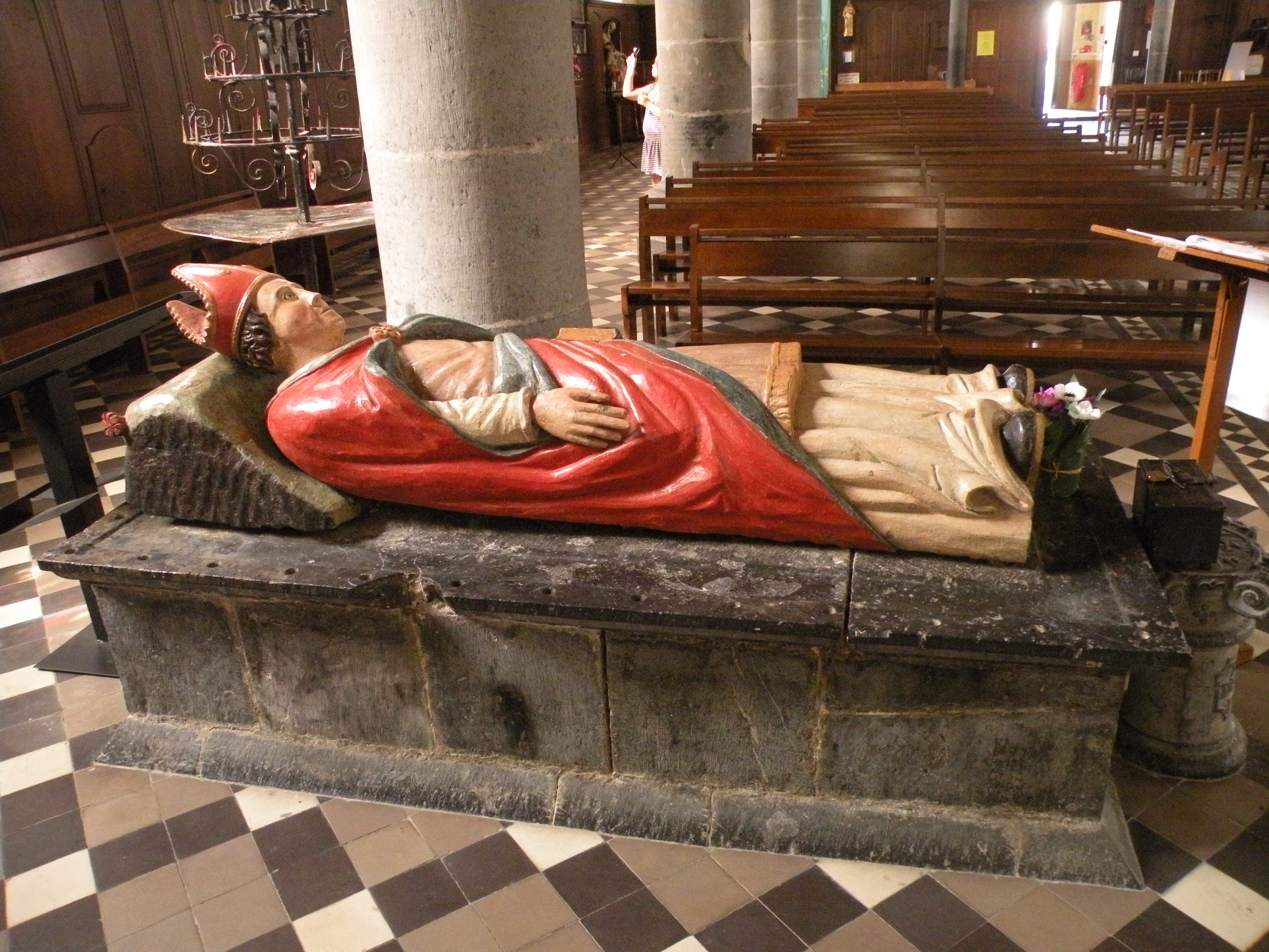 gisant saint Etton Église Saint-Etton de Dompierre-sur-Helpe